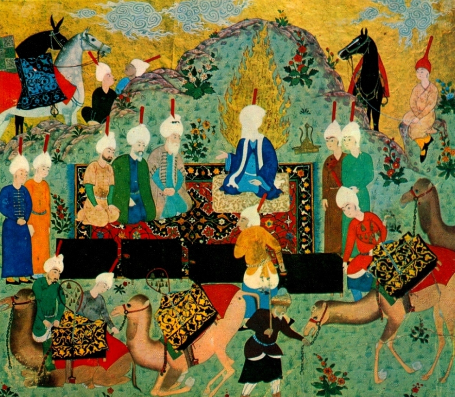 Касим Али. Хорасанские купцы перед Мухаммадом ибн Али ал-Бакиром. История правоверных имамов. 1525 РНБ